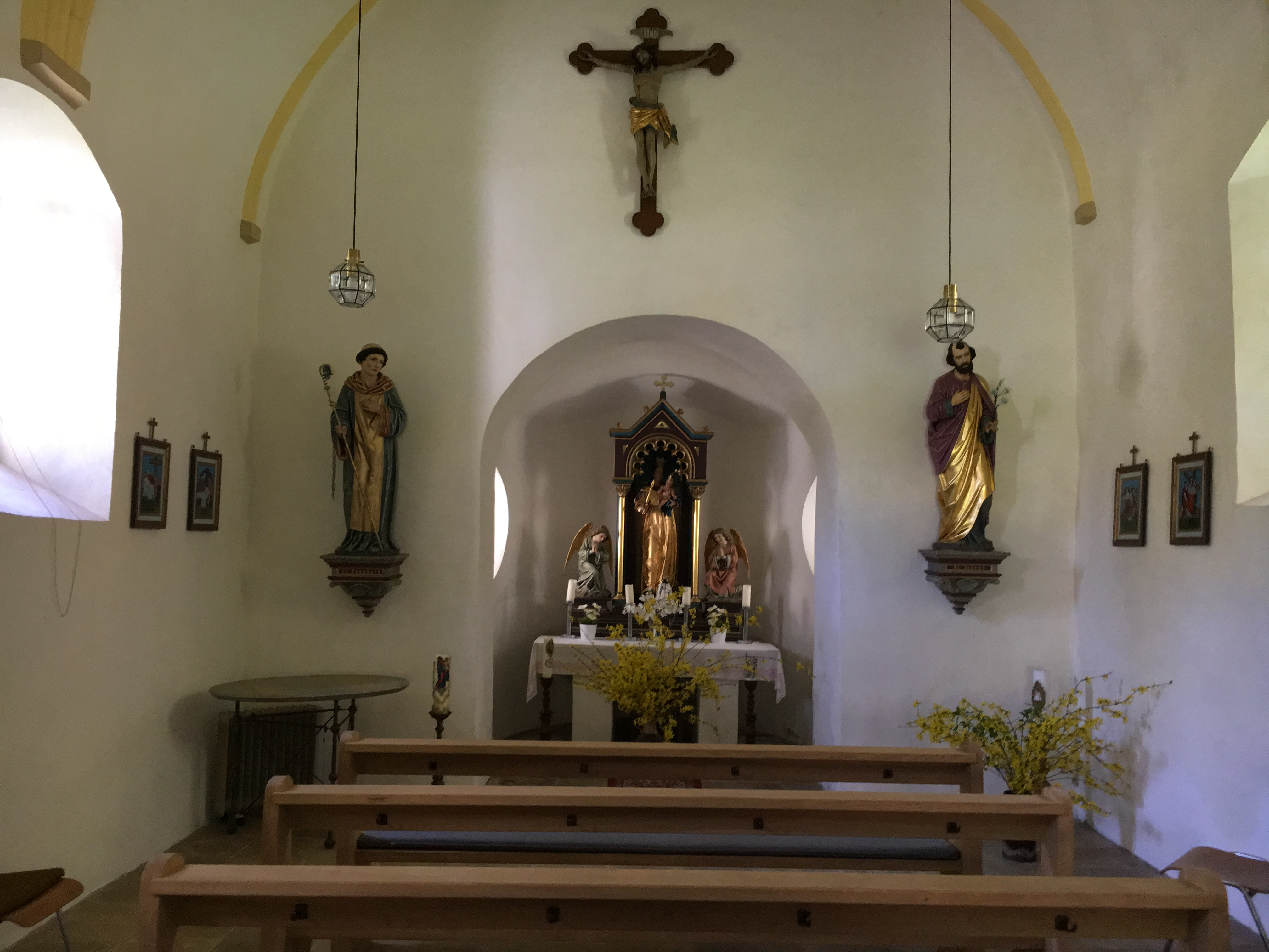 Die Kapelle Maria Einsiedeln ist ein kleines Kirchlein, etwa zwei Kilometer südlich von Neukirchen vorm Wald in der Ortschaft Geiermühle. Die Kapelle Maria Einsiedeln ist im Jahr 1641 von Stefan Geier gebaut worden – nach dem Vorbild der weltberühmten „von Gott geweihten Kapelle Maria Einsiedeln” in der Schweiz. Um ihren Bau rankt sich eine Sage, an die auch die über dem Sturz der Kapelle zu sehenden Fingerabdrücke erinnern. Quelle